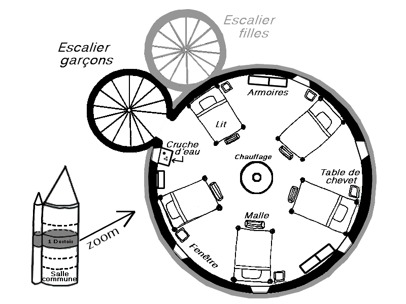 Interprétation de l'organisation de la tour de Gryffondor, et aménagement d'un dortoir